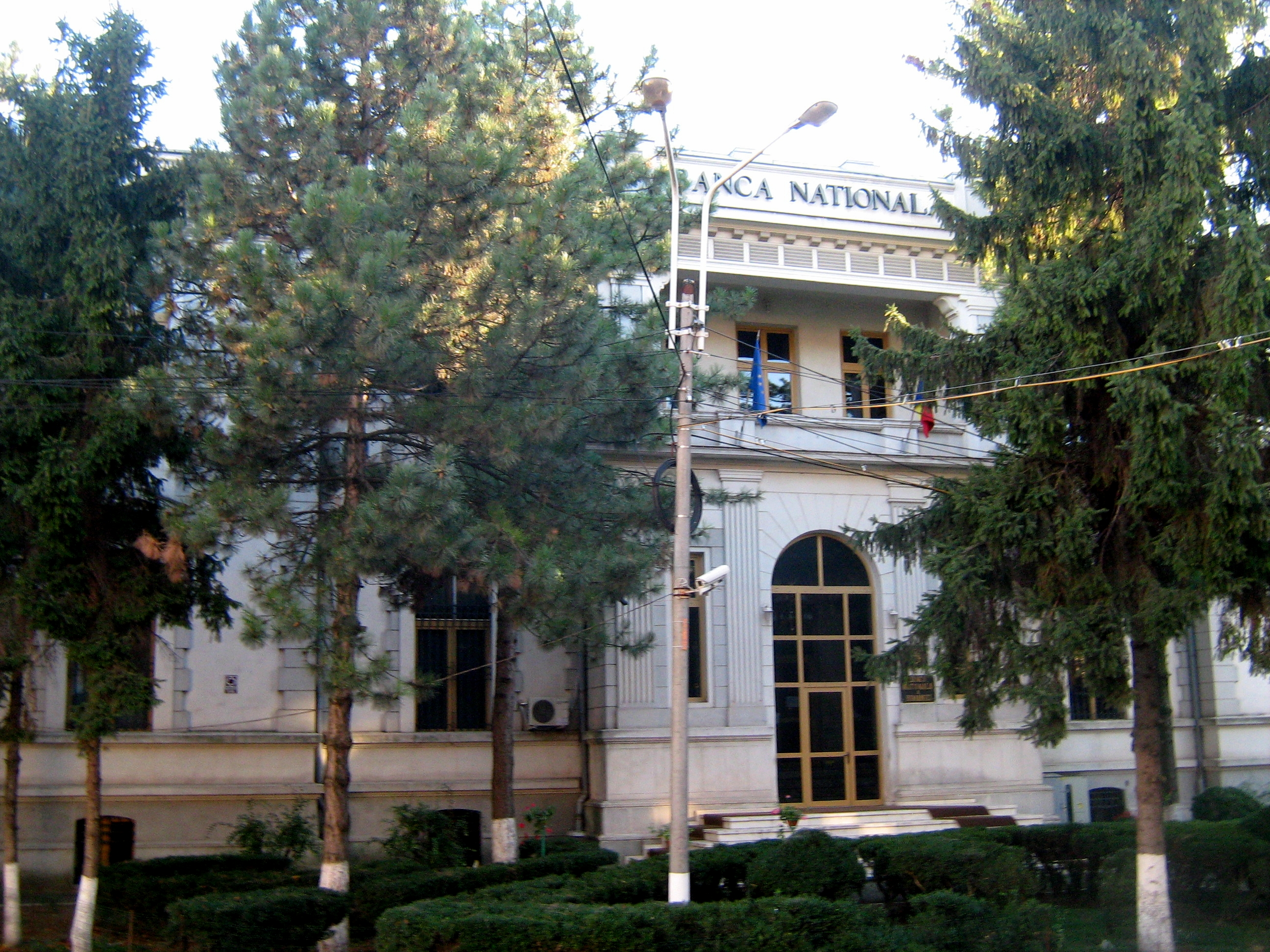 Sucursala Galați a Băncii Naționale a României